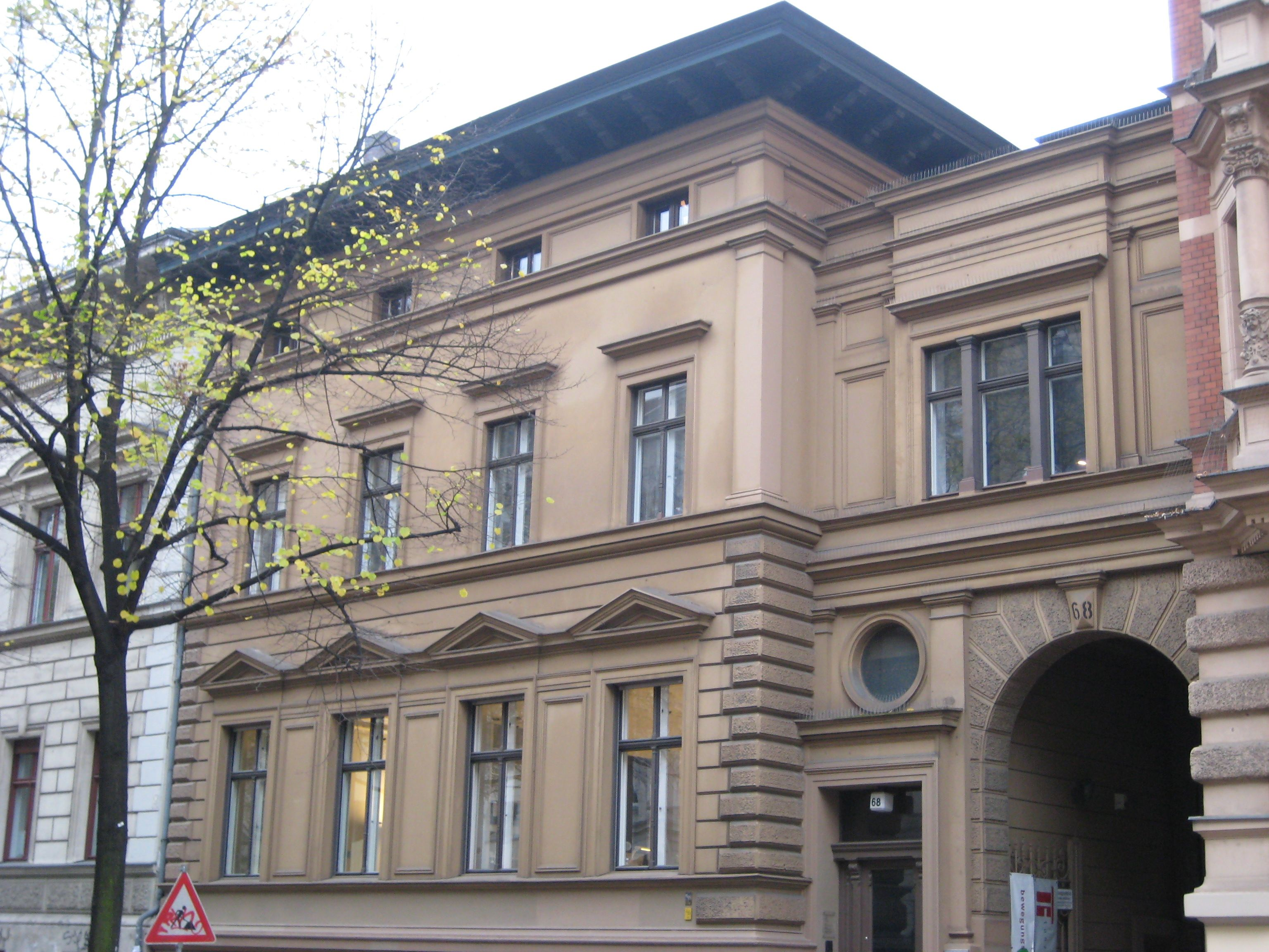 Straßenseite der Villa des Ernst-Gettke-Hauses, Möckernstraße 68, Berlin. Front of the Villa of the Ernst-Gettke-House, Möckernstraße 68, Berlin.